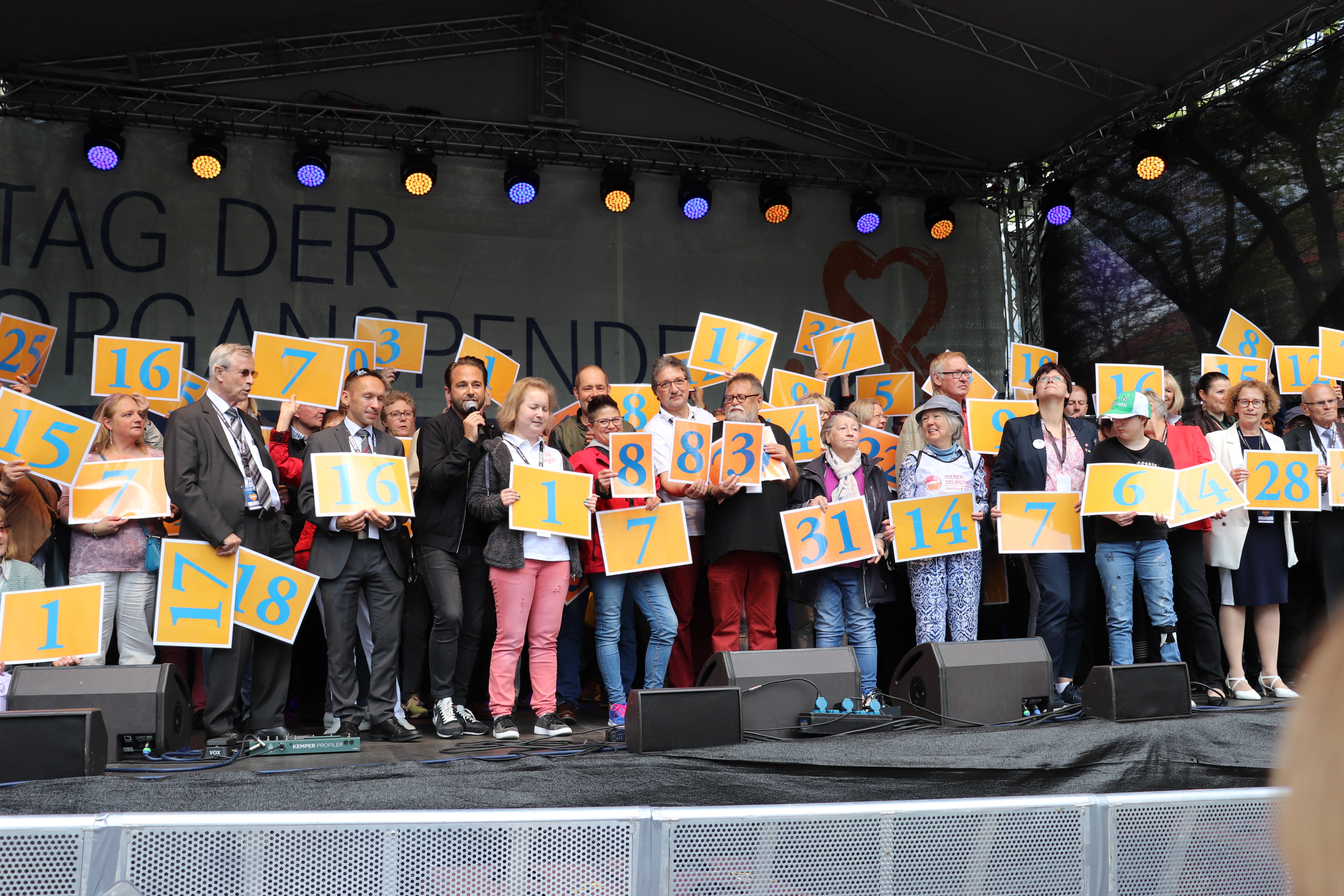 Die Aktion "Geschenkte Lebensjahre" gehört zum zentralen Bestandteil des Tags der Organspende